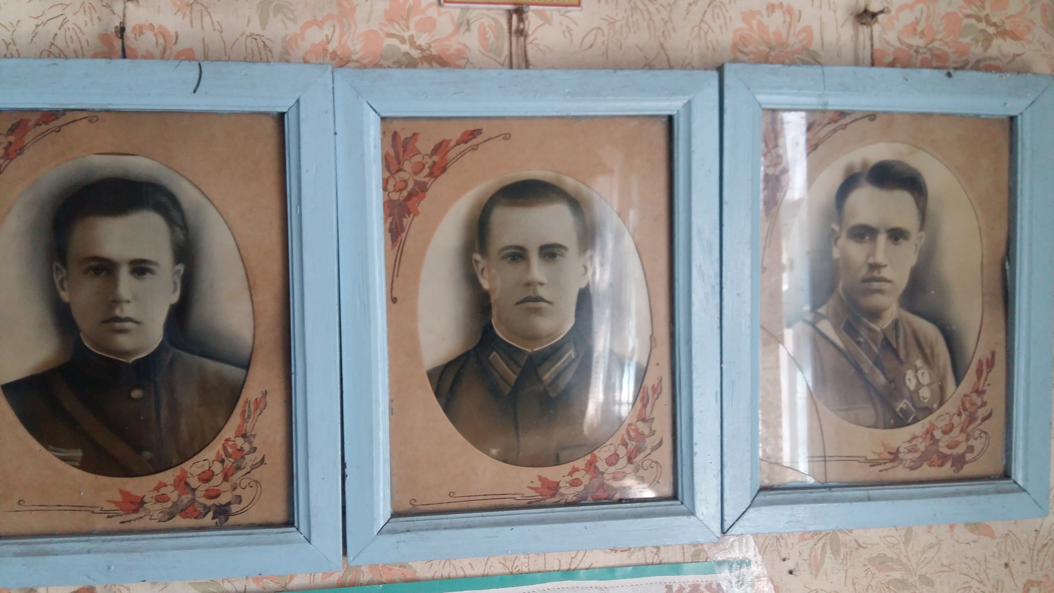 Братья Праведные село Викторово